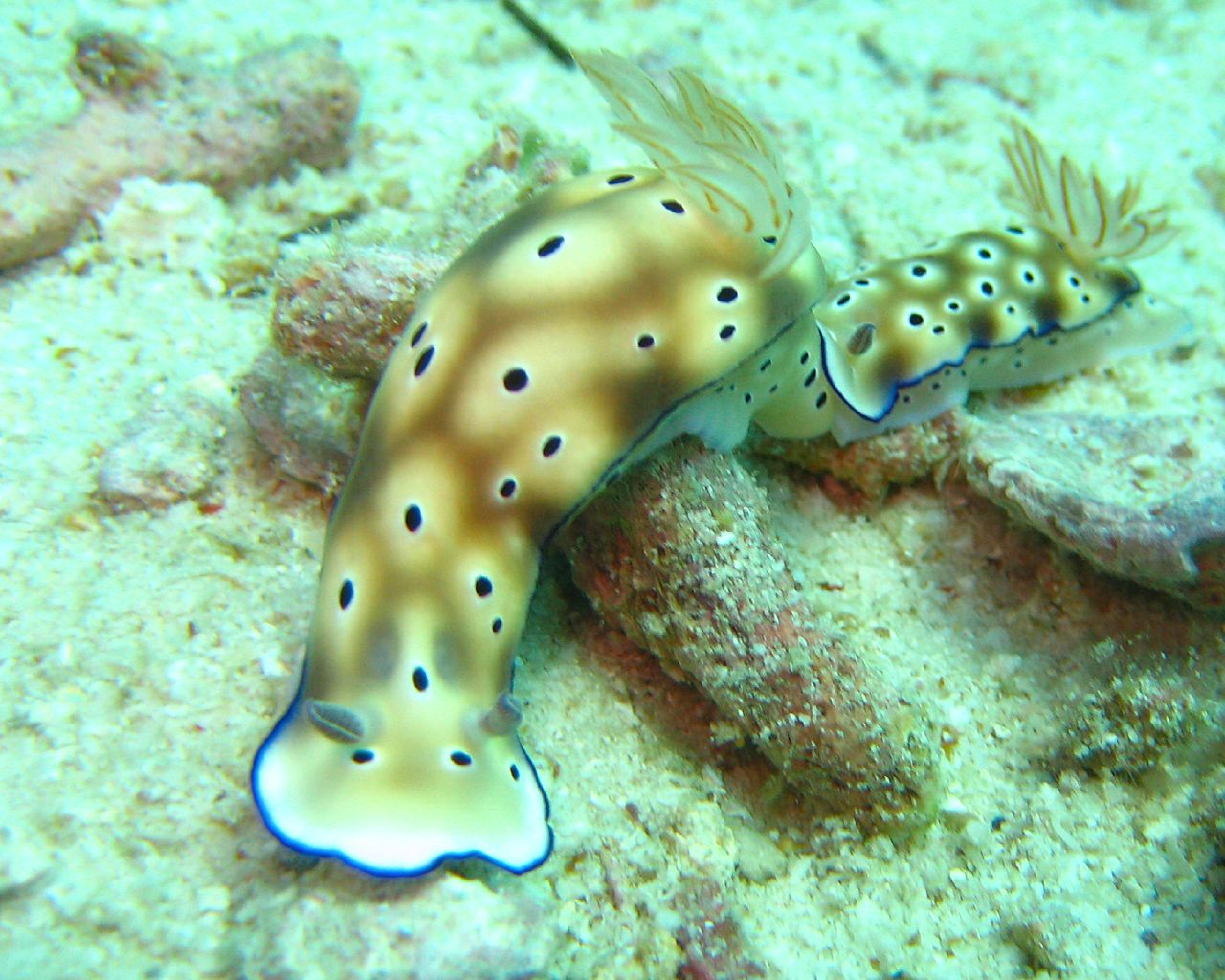 HYpselodoris tryoni (synonym: Risbecia tryoni)